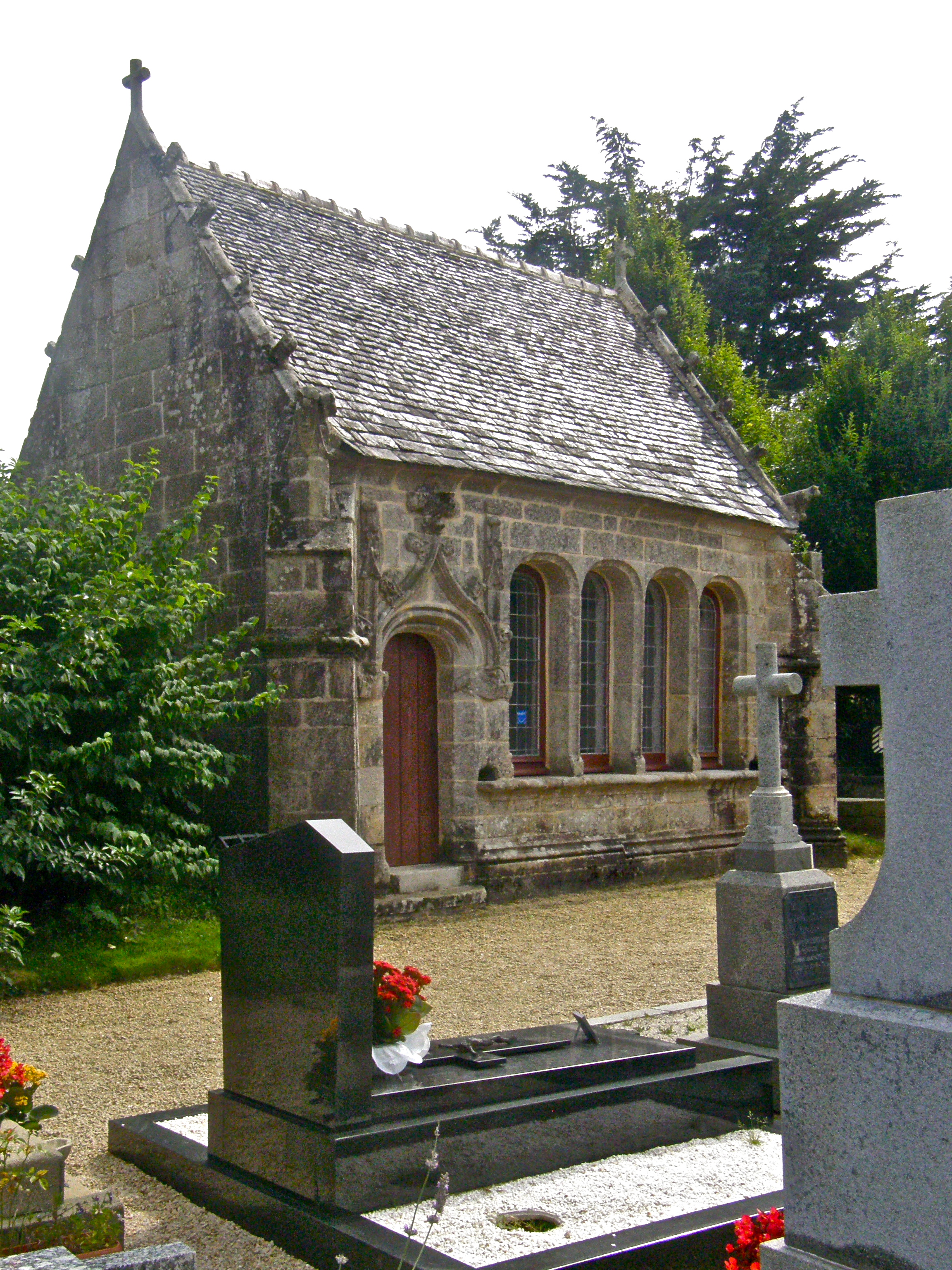 L'ossuaire dans l'enclos paroissial de TREMAOUEZAN